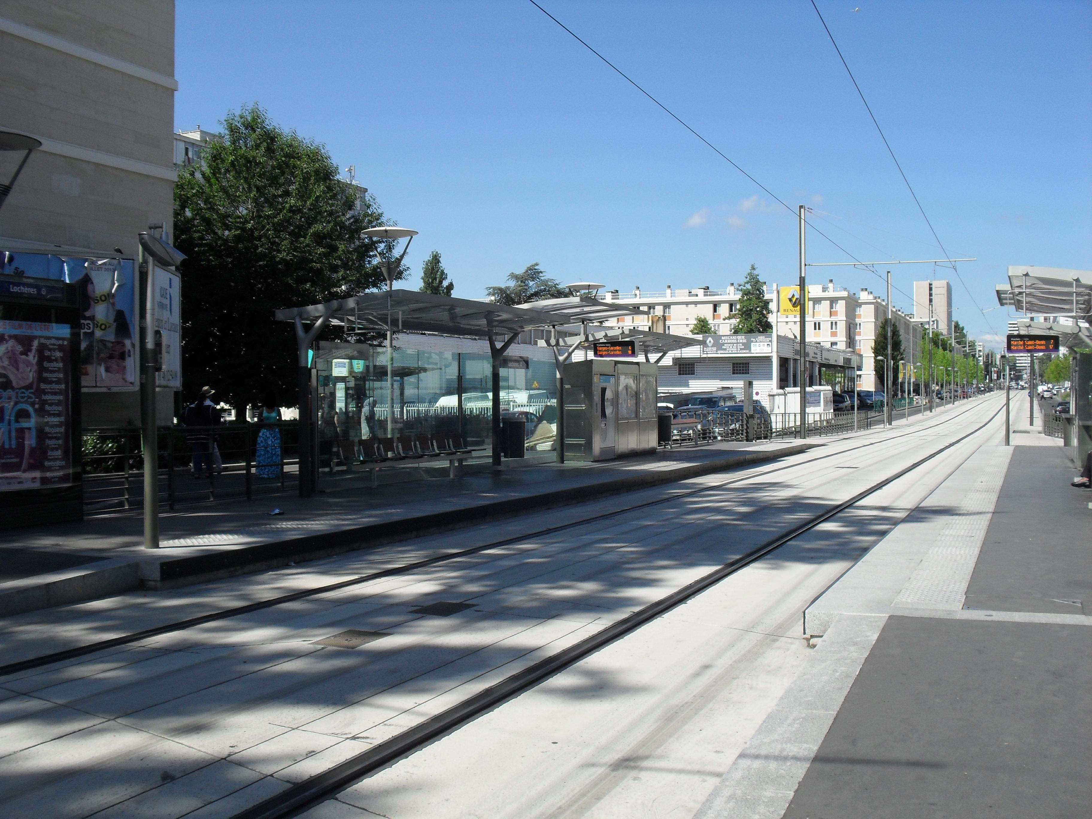 La station T5 "Lochères".